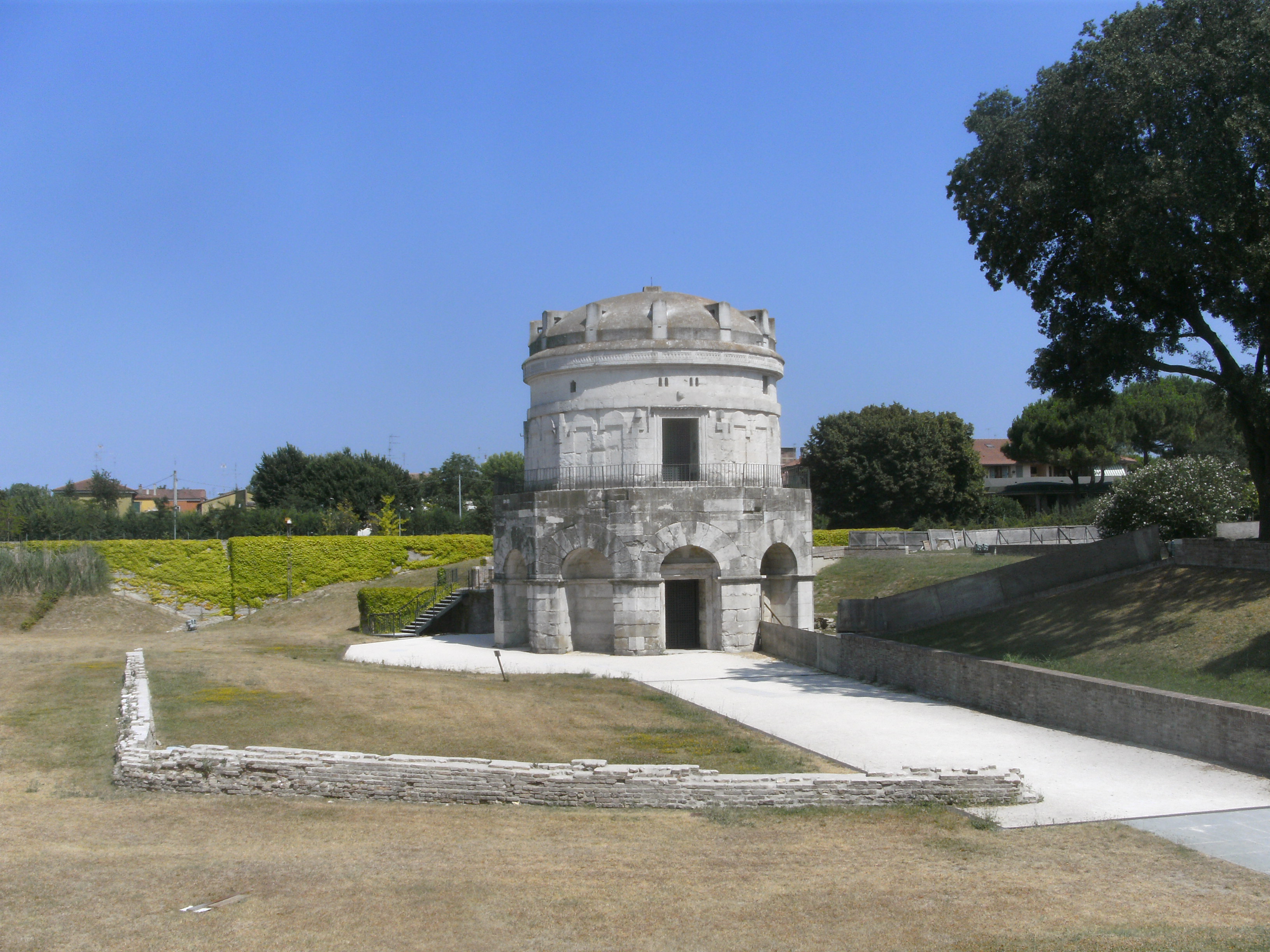 Ravenna (Italien), Mausoleum des Theoderich